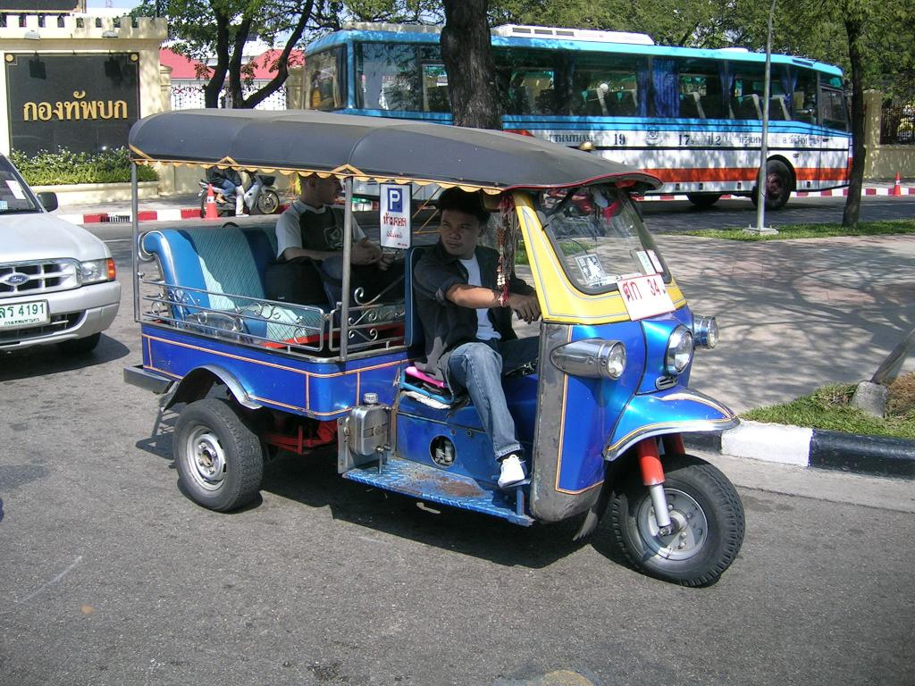 A tuk tuk in Bangkok. Photo by Brownie13.